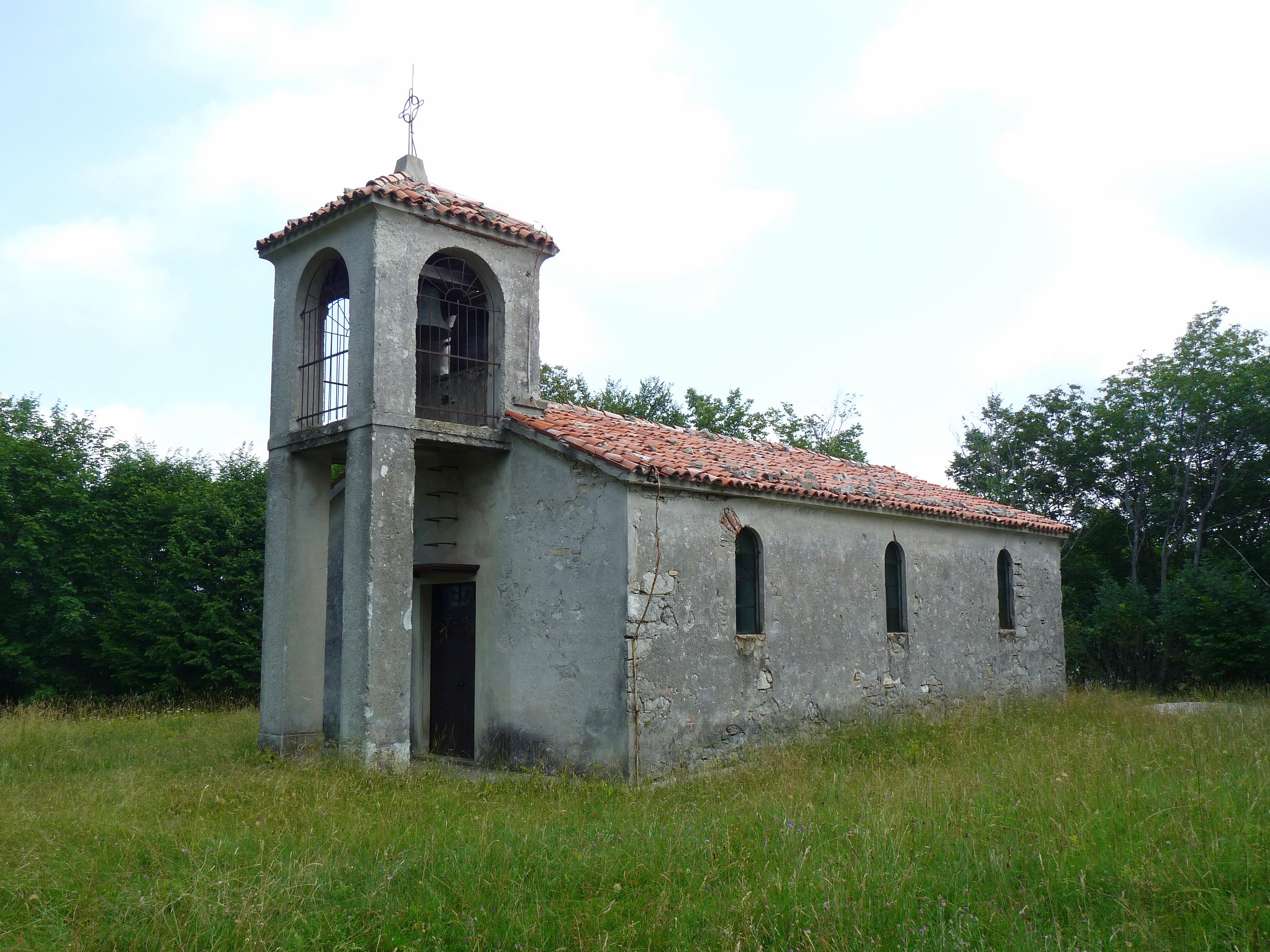 Gendrca (cerkev sv. Gertrude na Koradi, Slovenija)